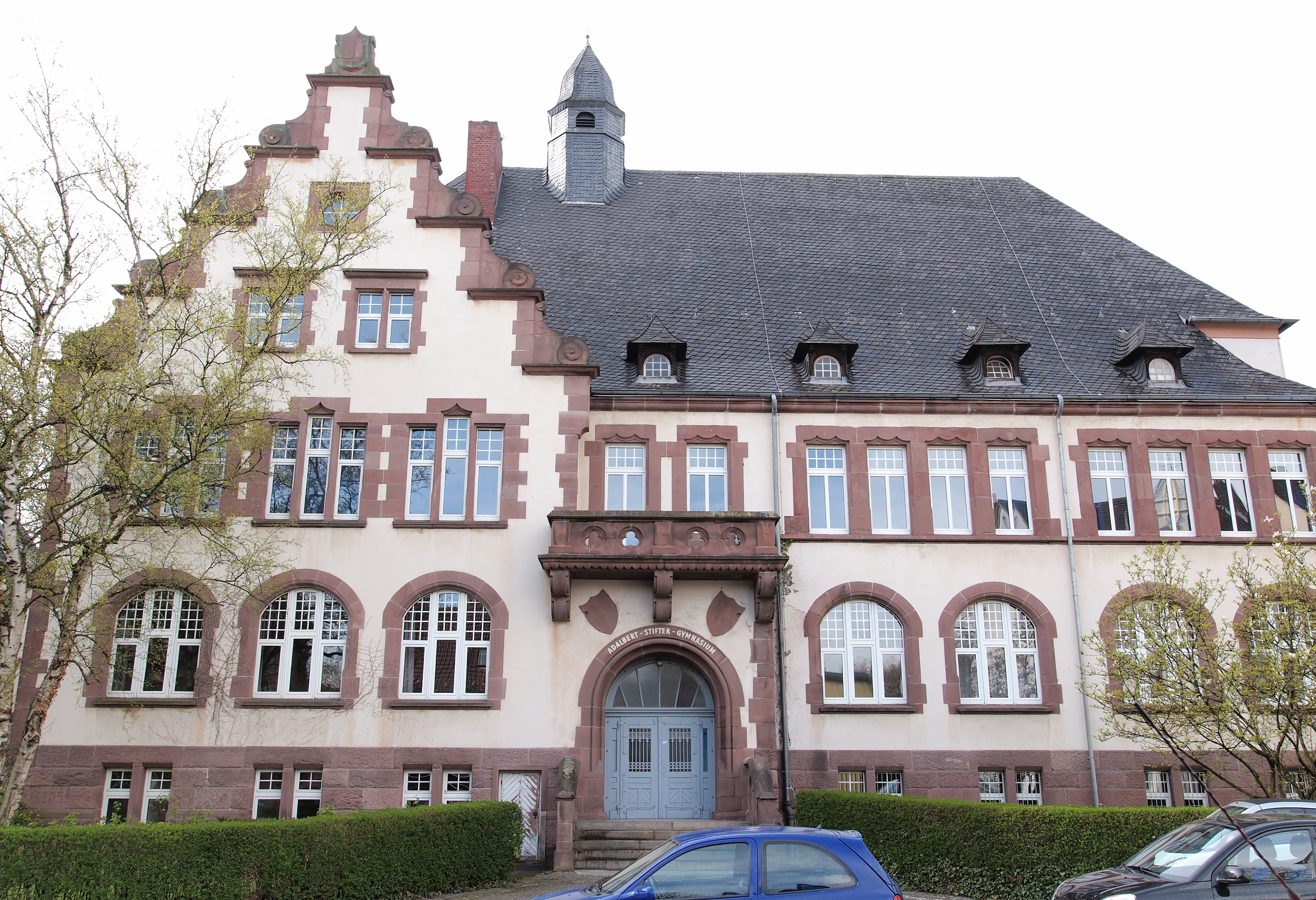 Oberstufengebäude des Adalbert-Stifter-Gymnasiums in Castrop, Baujahr 1905